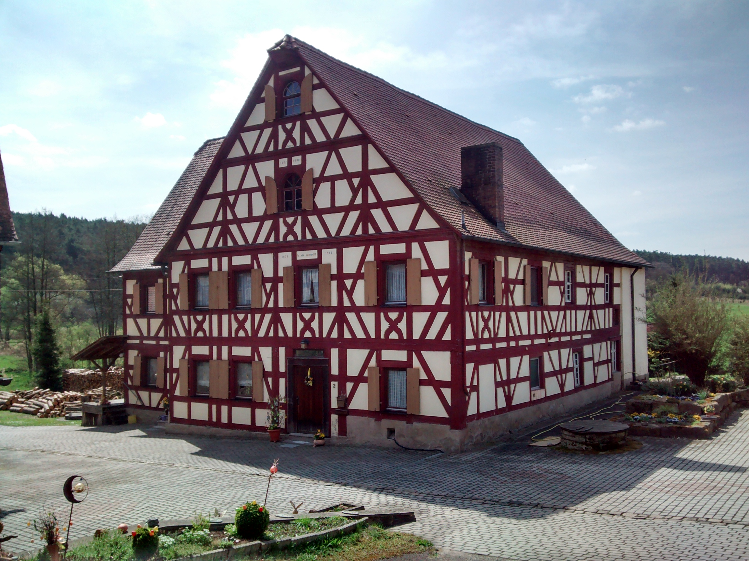 Mühle in Oberniederndorf